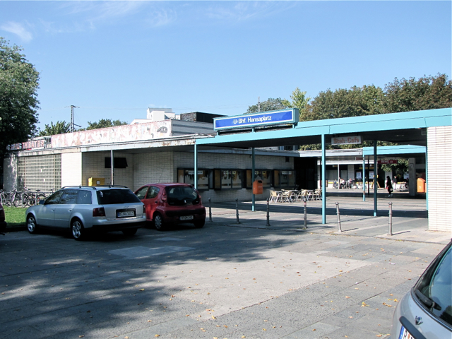 Hansaplatz, Hansviertel, Tiergarten, Berlin